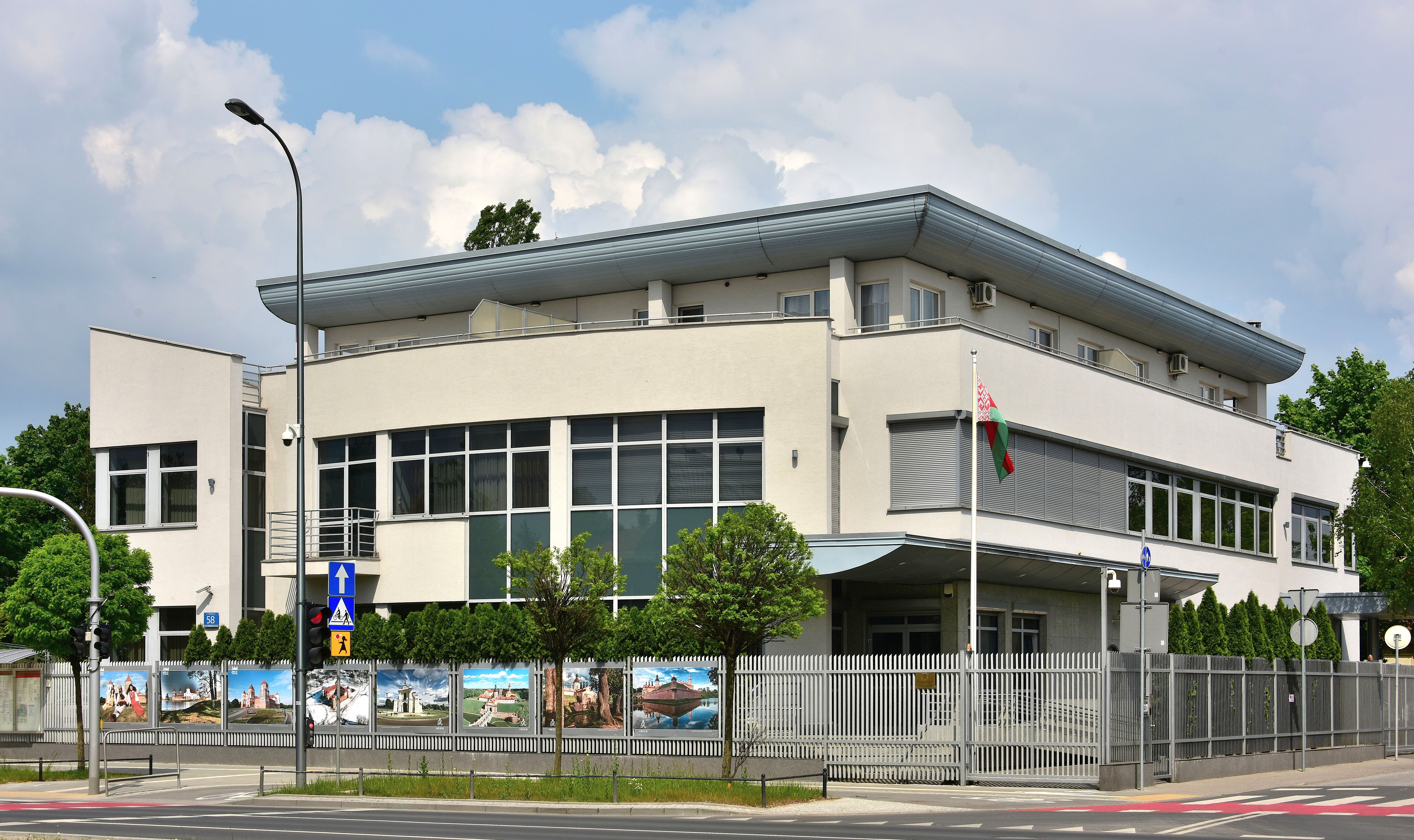 Ambasada Białorusi w Warszawie, ul. Wiertnicza 58